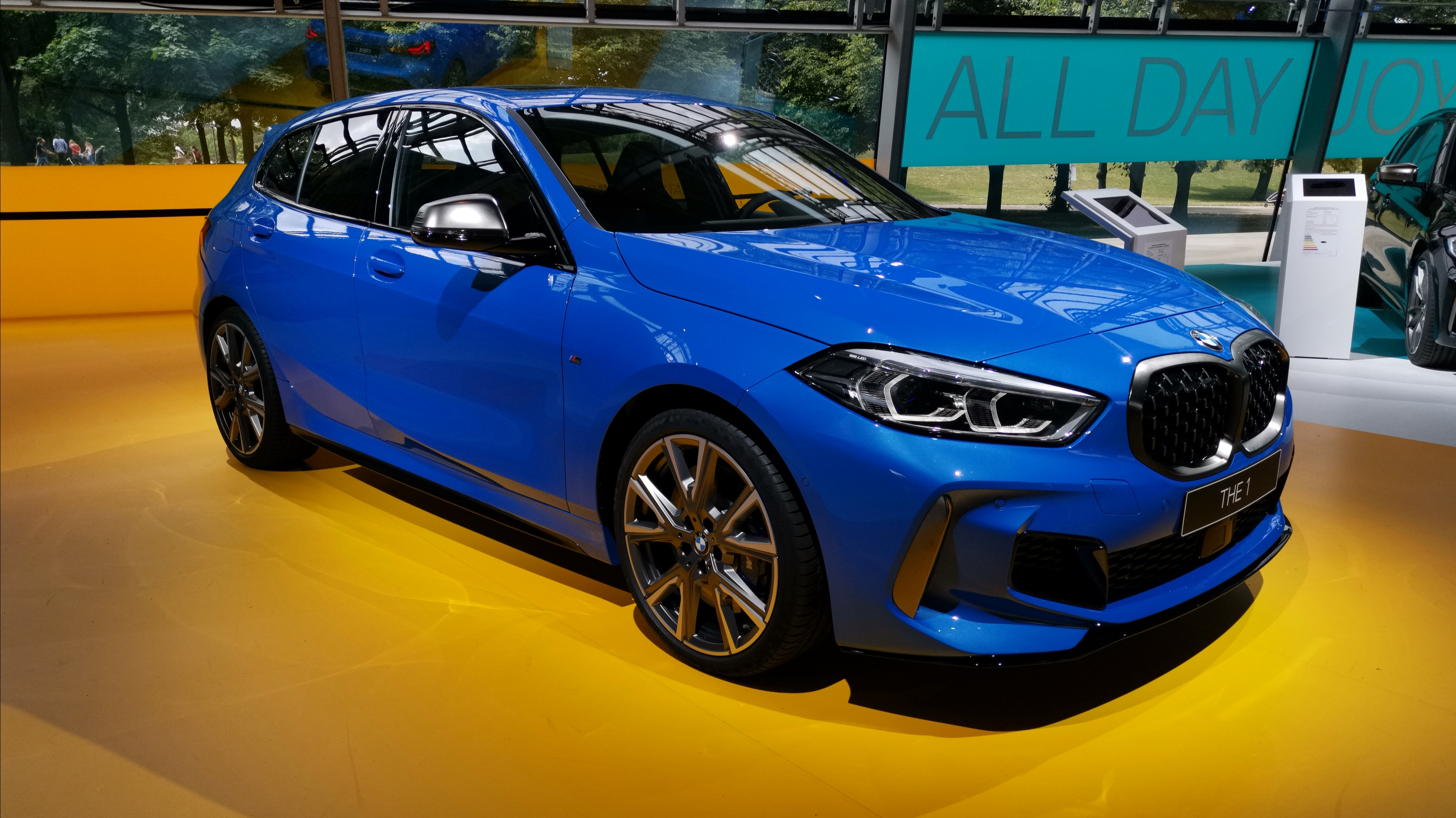 BMW M135i X-Drive ausgestellt in der BMW Welt im Rahmen der #Next-Gen Präsentation